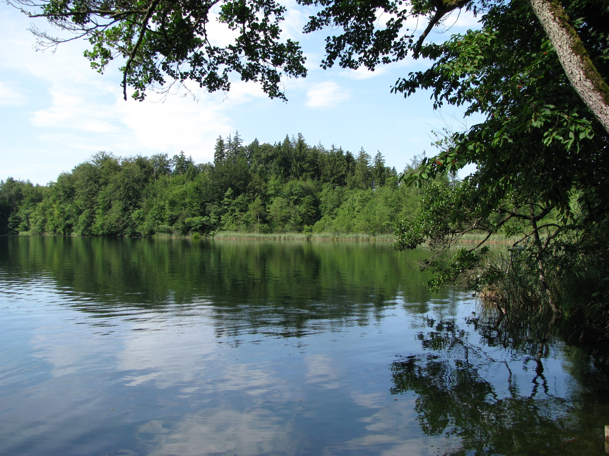 Nordzipfel des Langbürgner Sees bei Hartmannsberg; Blick nach Südwesten